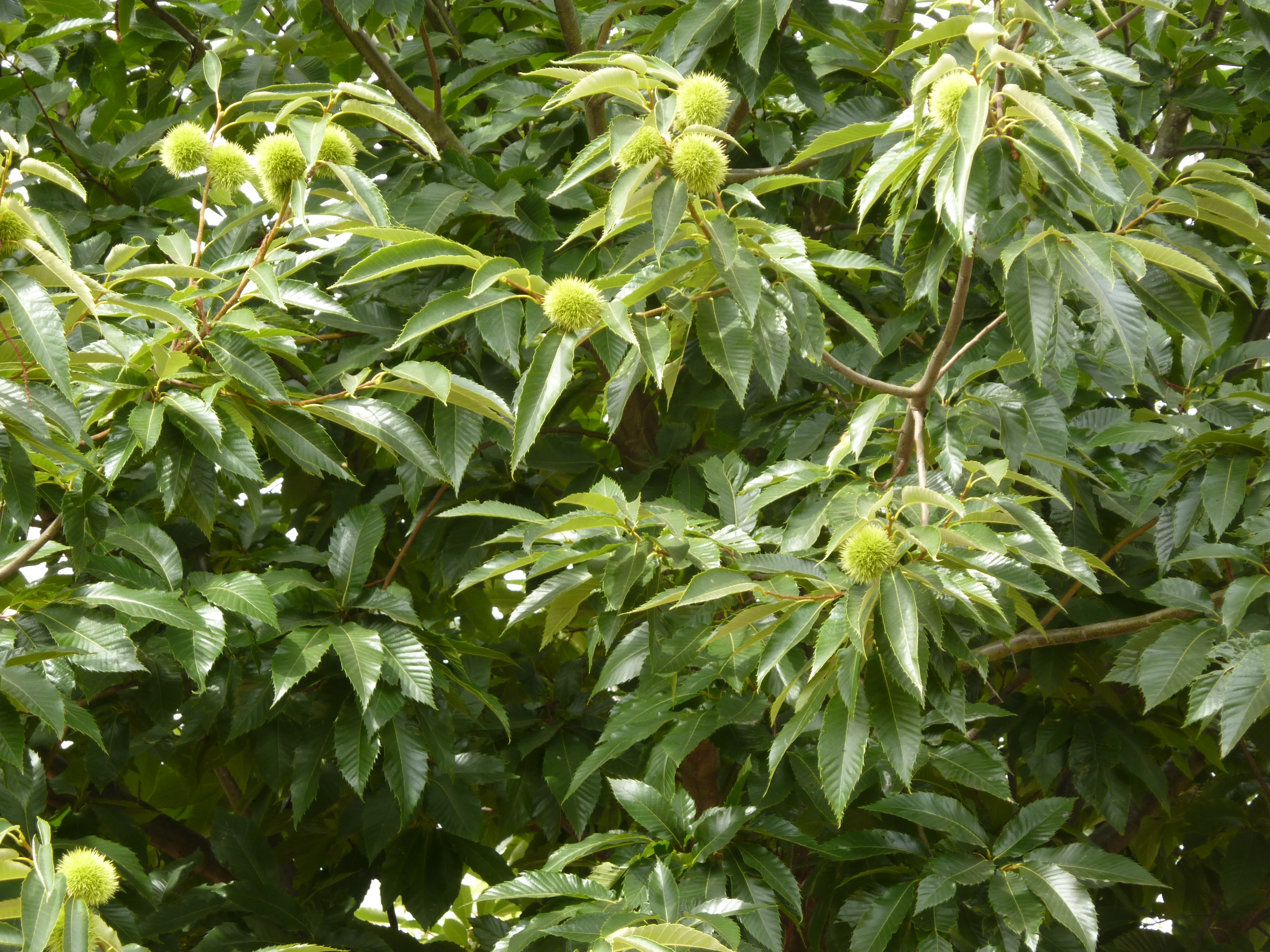 Erizos de un castaño en Galicia